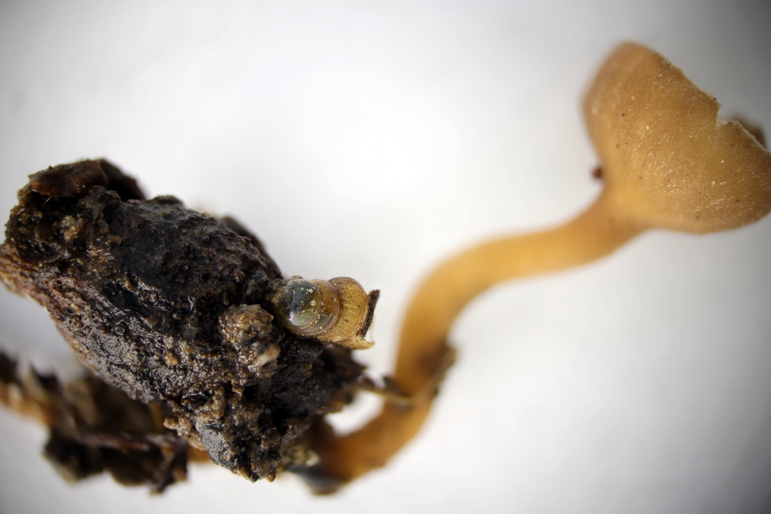 Monilinia johnsonii (siehe auch Monilinia), Apothecien auf einer Crataegus-Frucht-Mumie